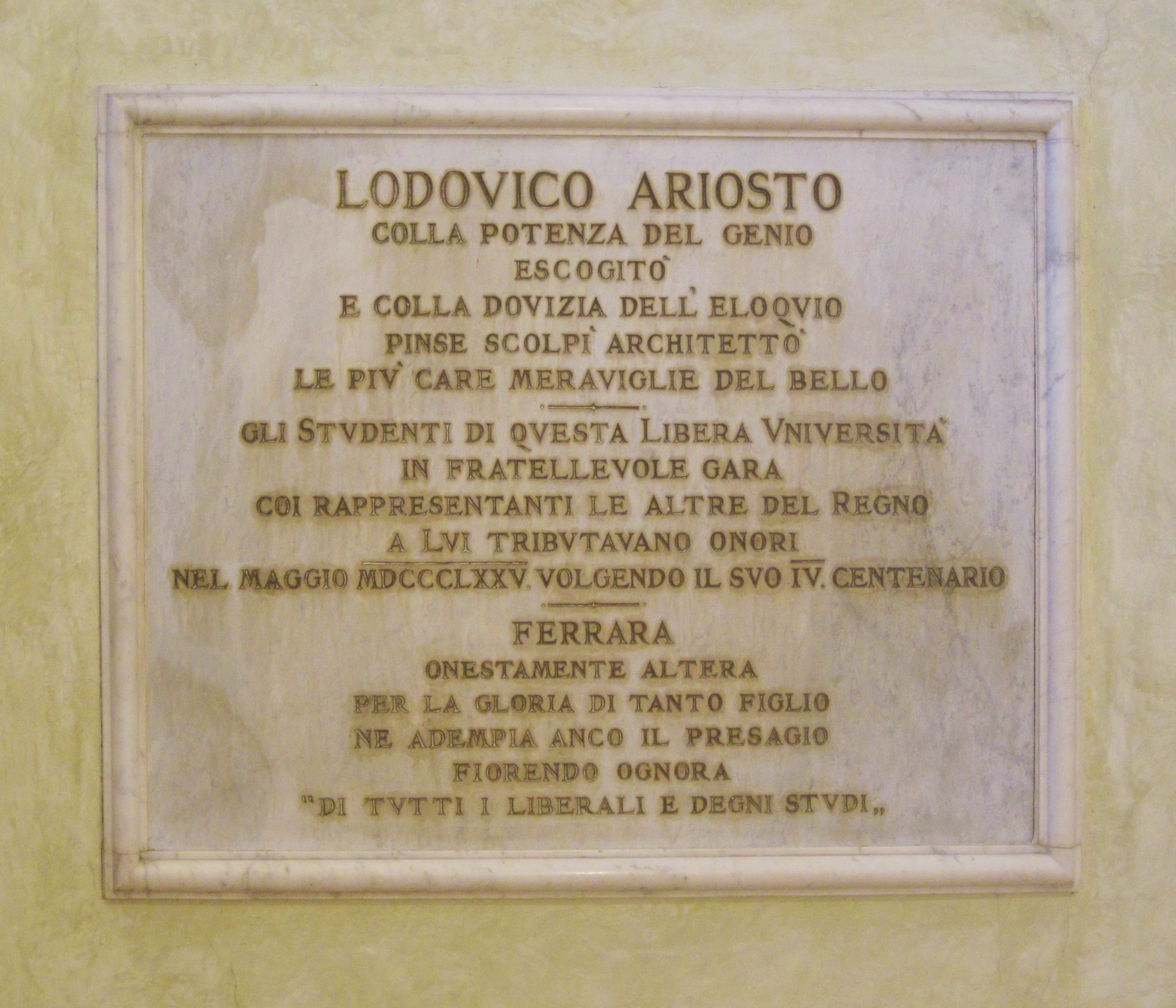 Lapide che ricorda Ludovico Ariosto nello scalone d'onore di palazzo Paradiso, a Ferrara, già sede universitaria e di recente sede della biblioteca comunale Ariostea